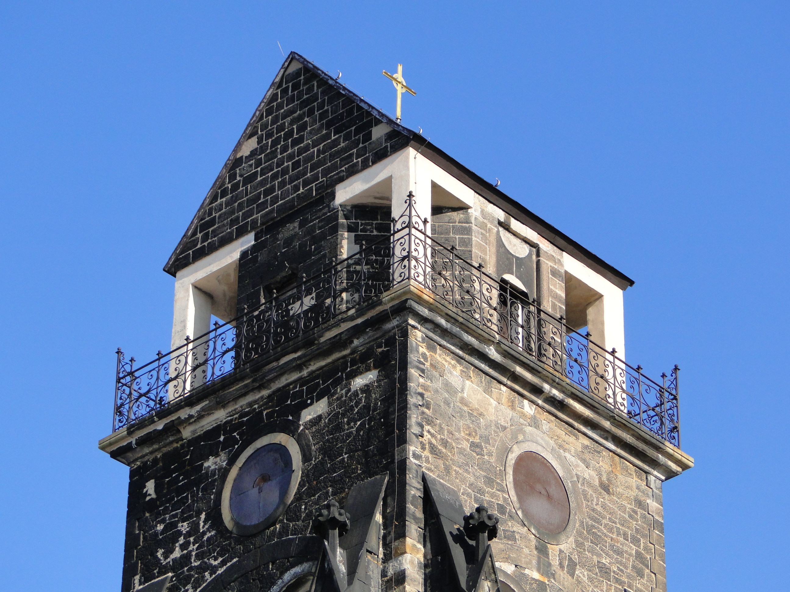 Der Glockenstuhl der Friedenskirche, 2005 erneuert